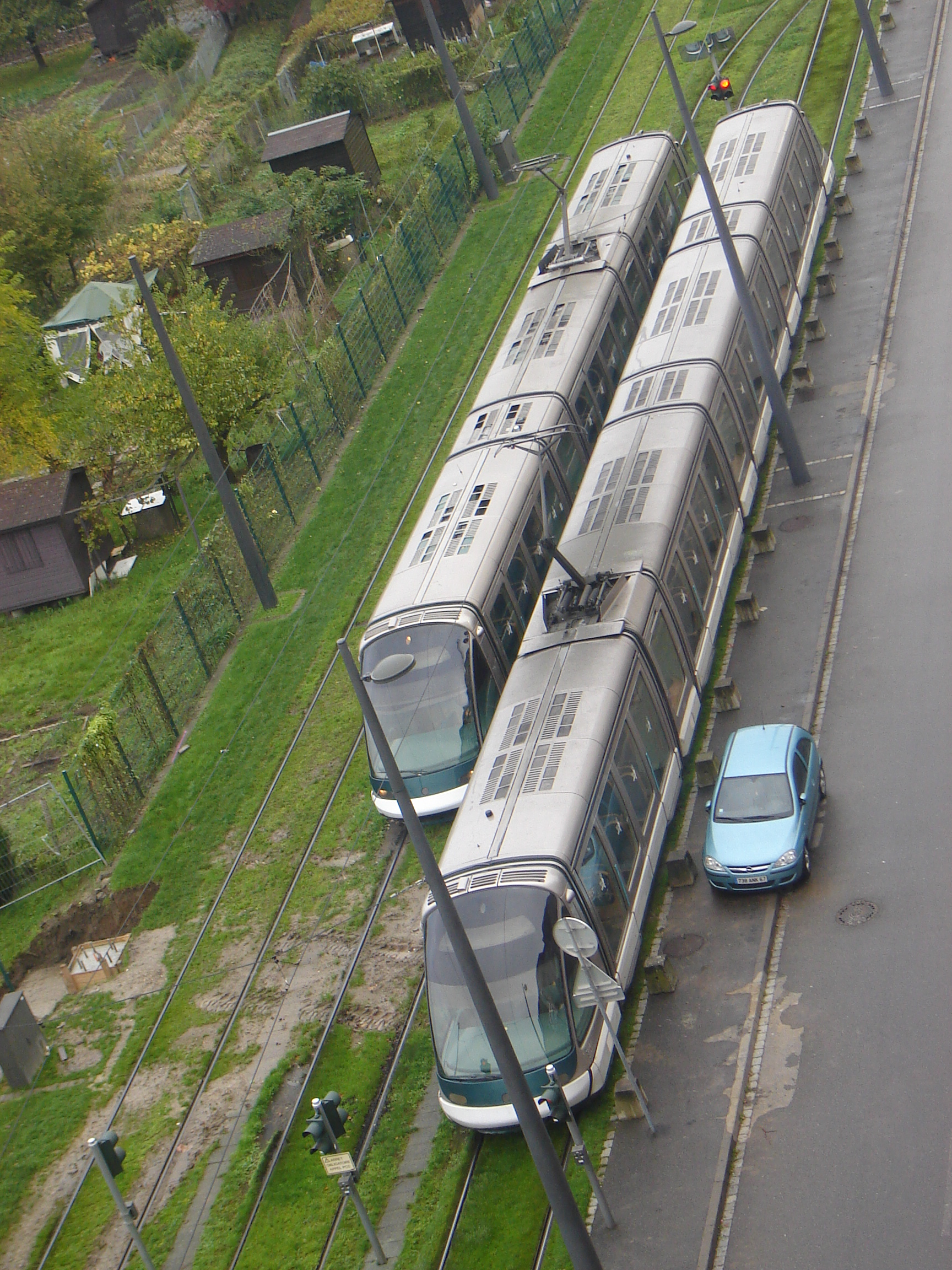 Différences entre un Eurotram 3 caisses et 4 caisses vu d'en haut, au terminus Elsau